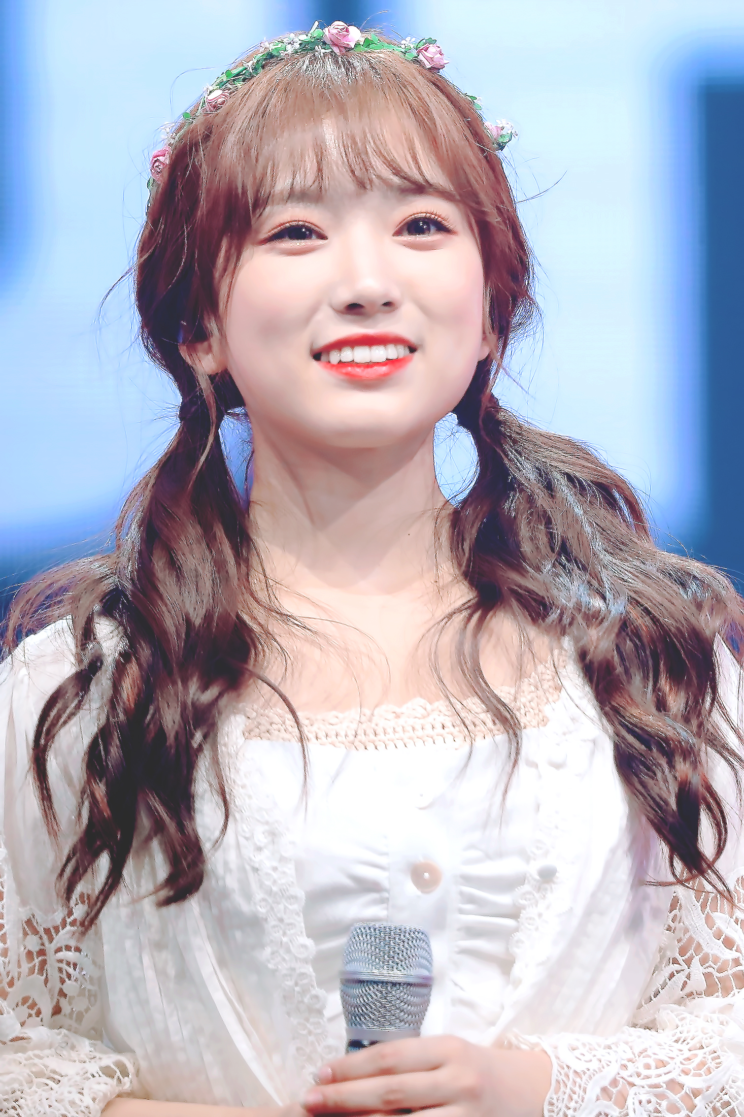 181029 SHOWCON 야부키 나코